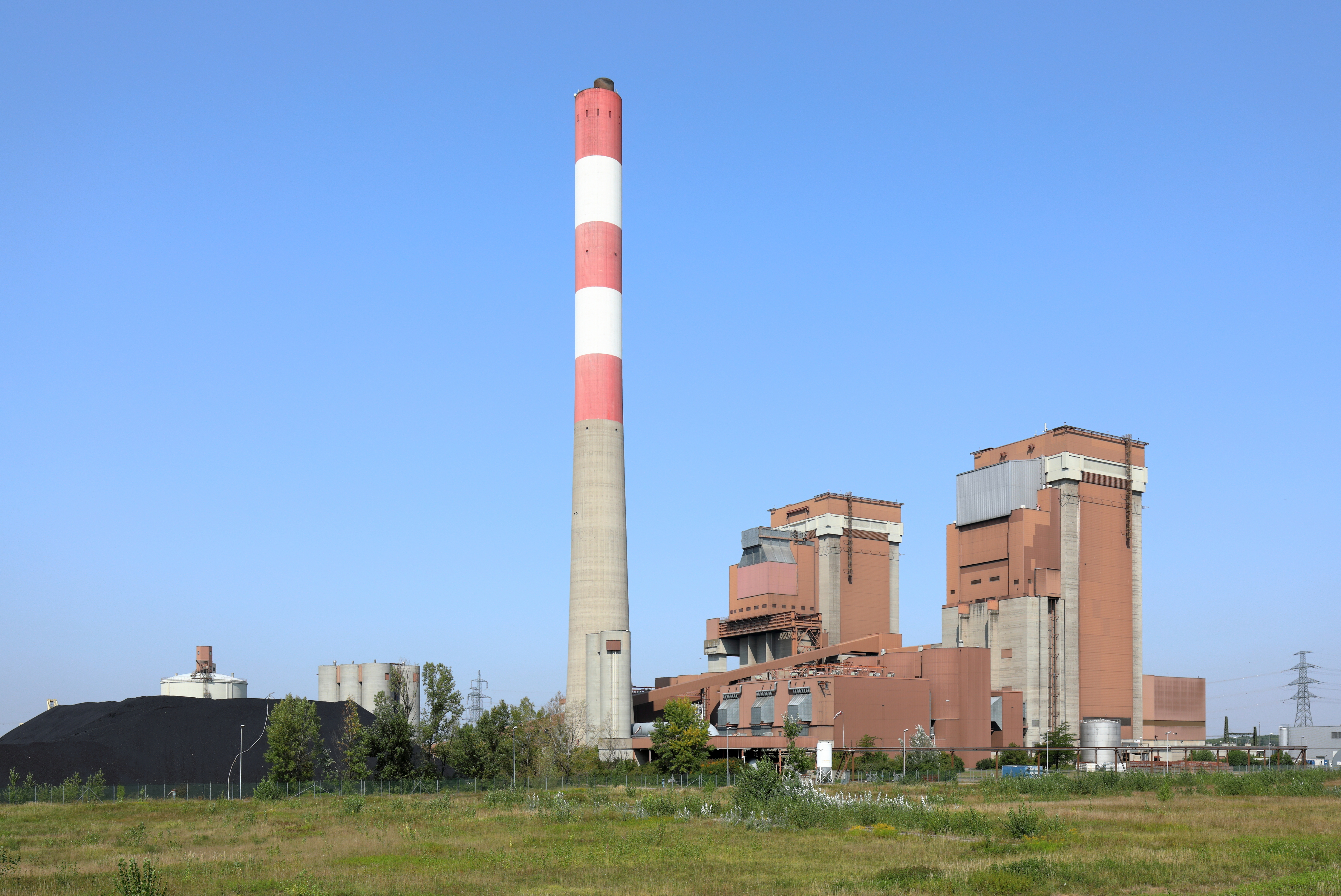 Südostansicht des Dampfkraftwerkes in Dürnrohr, ein Ortsteil der niederösterreichische Marktgemeinde Zwentendorf an der Donau.Das kalorische Kraftwerk mit einem rd. 205 m hohen Schornstein und zwei Kraftwerksblöcken mit je einer Leistung von rd. 350 MW wurde 1987 in Betrieb genommen und ist das letzte Kohlekraftwerk Österreichs. Der Wirkungsgrad wird durch die Auskopplung von Fernwärme, mit der St. Pölten und die Ortschaften Zwentendorf sowie Pischelsdorf versorgt werden, erhöht. Zusätzlich liefert das Kraftwerk der Bioethanolanlage der AGRANA einen Großteil des benötigten Prozessdampfes und erhält Dampf von der unmittelbar östlich situierten EVN-Abfallverwertung-Anlage. Anfang August 2019 wurde die Stromerzeugung mittels Kohleverbrennung zur Gänze eingestellt.